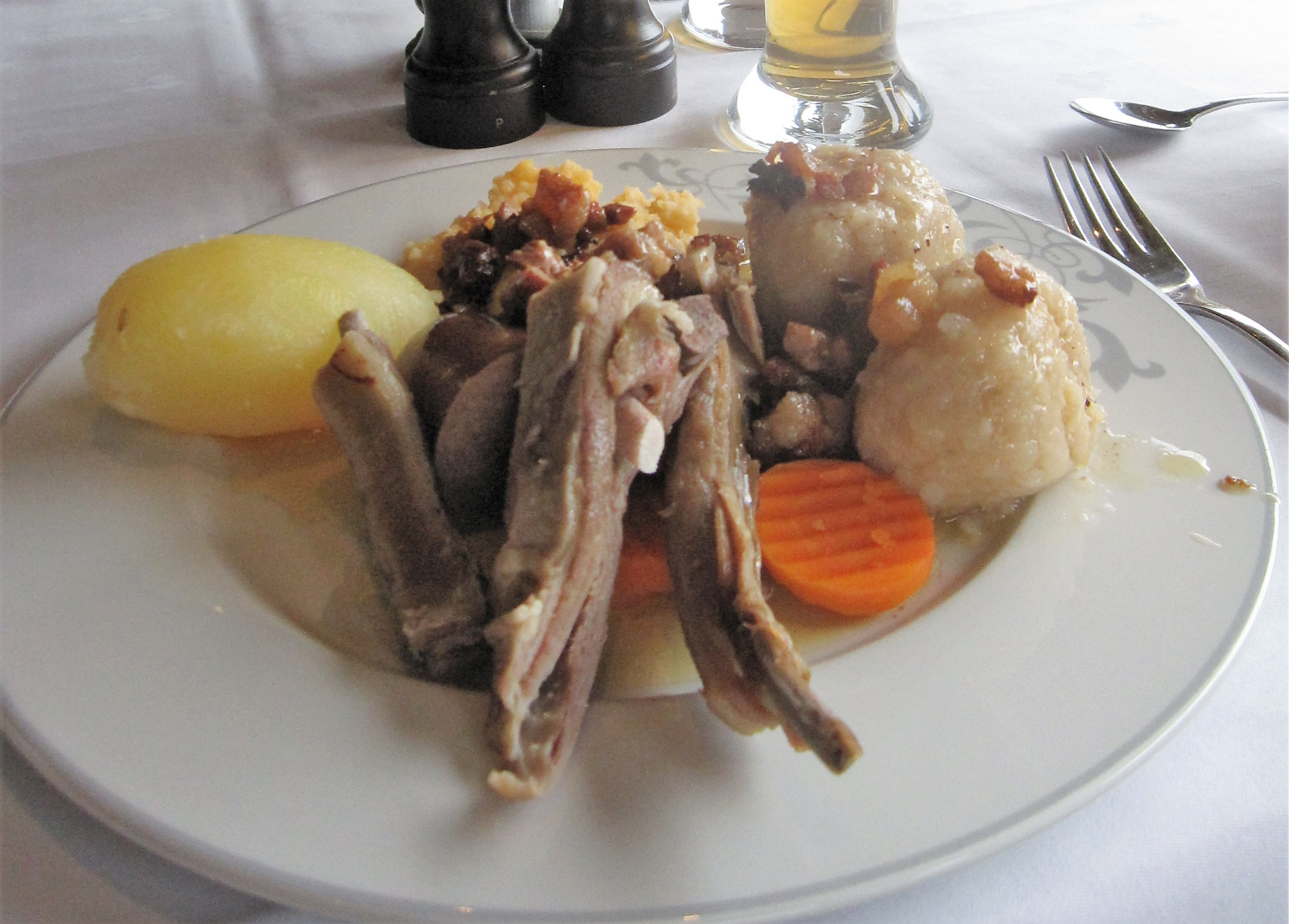 Pinnekjøtt (gepökelte Lammrippen) mit kålrabistappe (Rübenmus), gekochter Kartoffel, Kartoffelklößen und Speck; in einem Restaurant in Flåm, Norwegen.